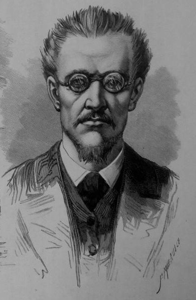 Portrait gravé d'Albert Pel, dit l'horloger de Montreuil, paru dans Le Journal illustré, n° 44, 2 novembre 1884, p. 348.